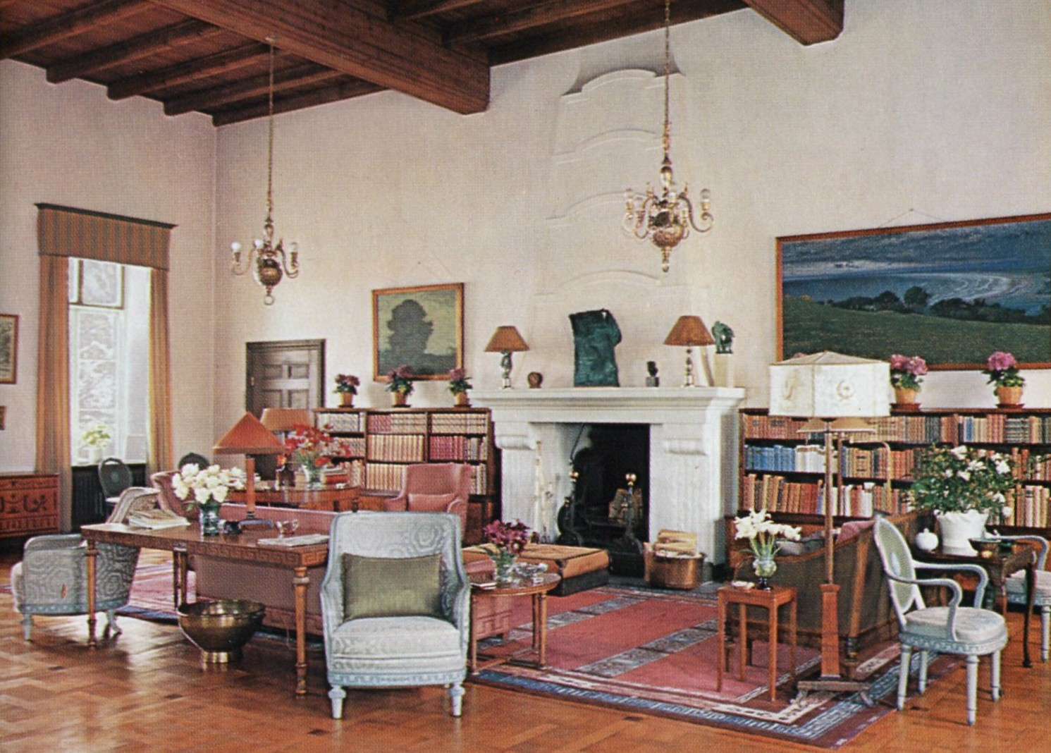 Ulriksdals slott, kungens stora salong